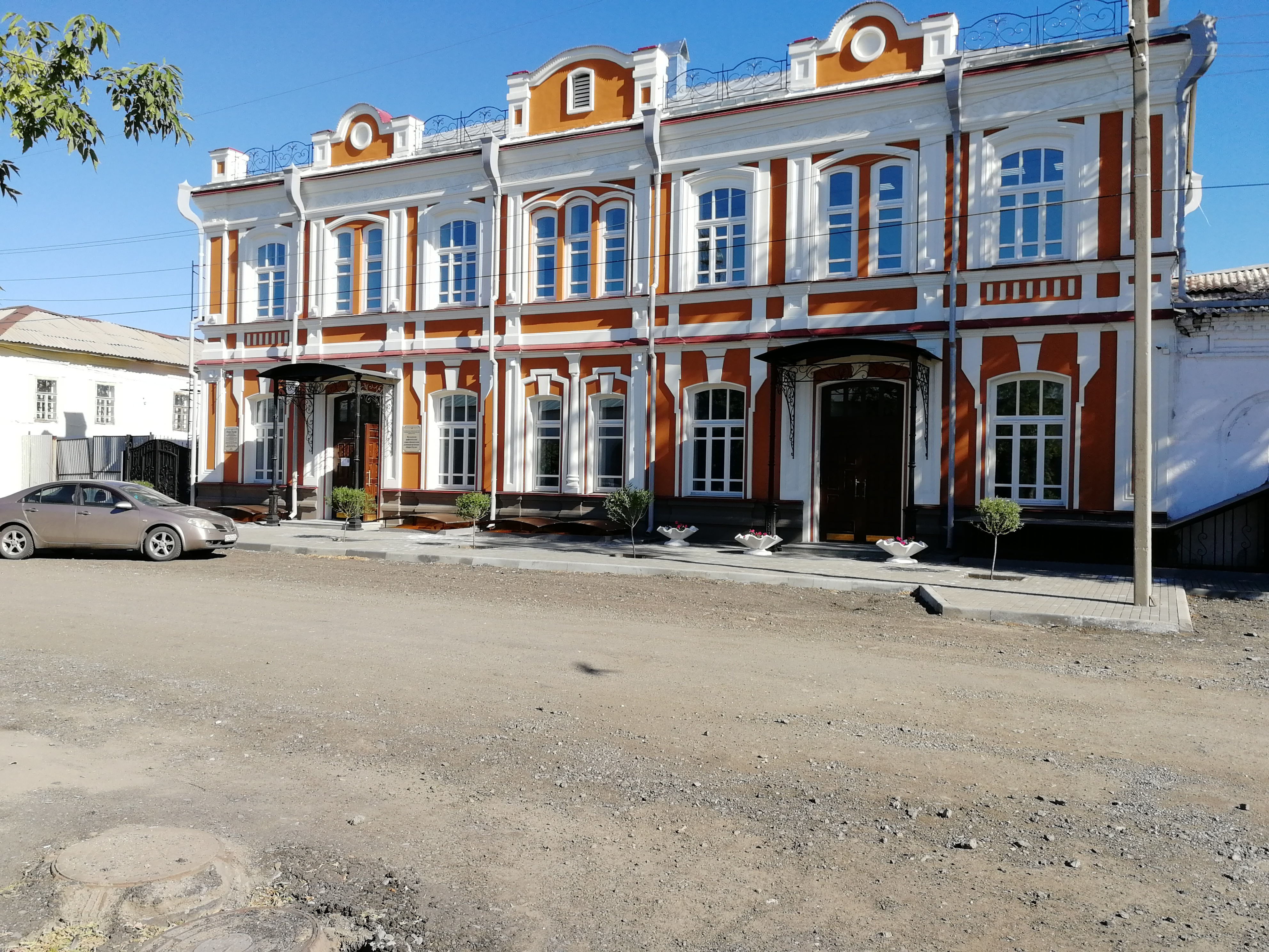 Здание в г.Троицке, где располагается Медресе «Расулия». июль 2018